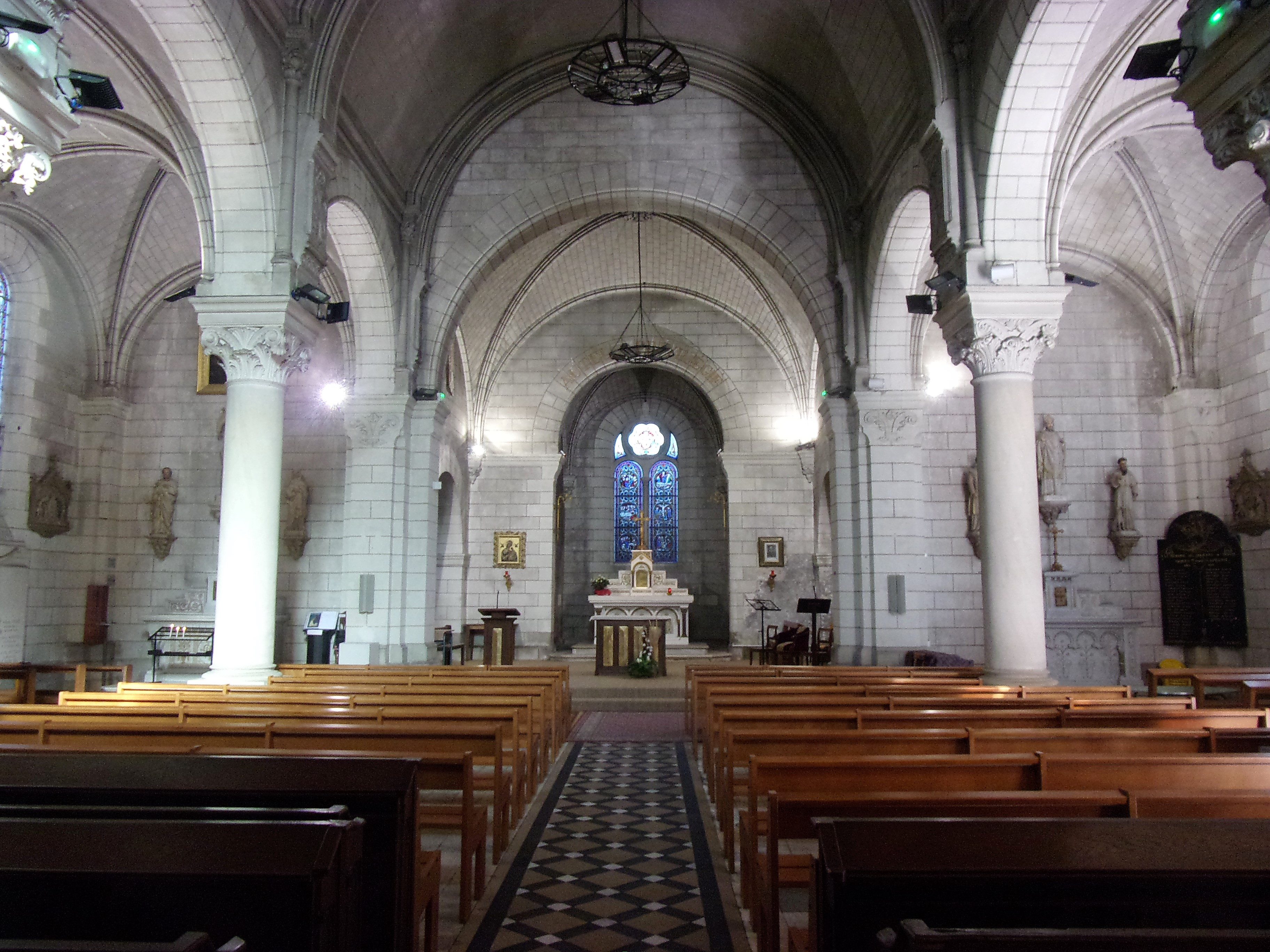 Vue intérieure de la nef de l'église Saint-Maixent de Veigné